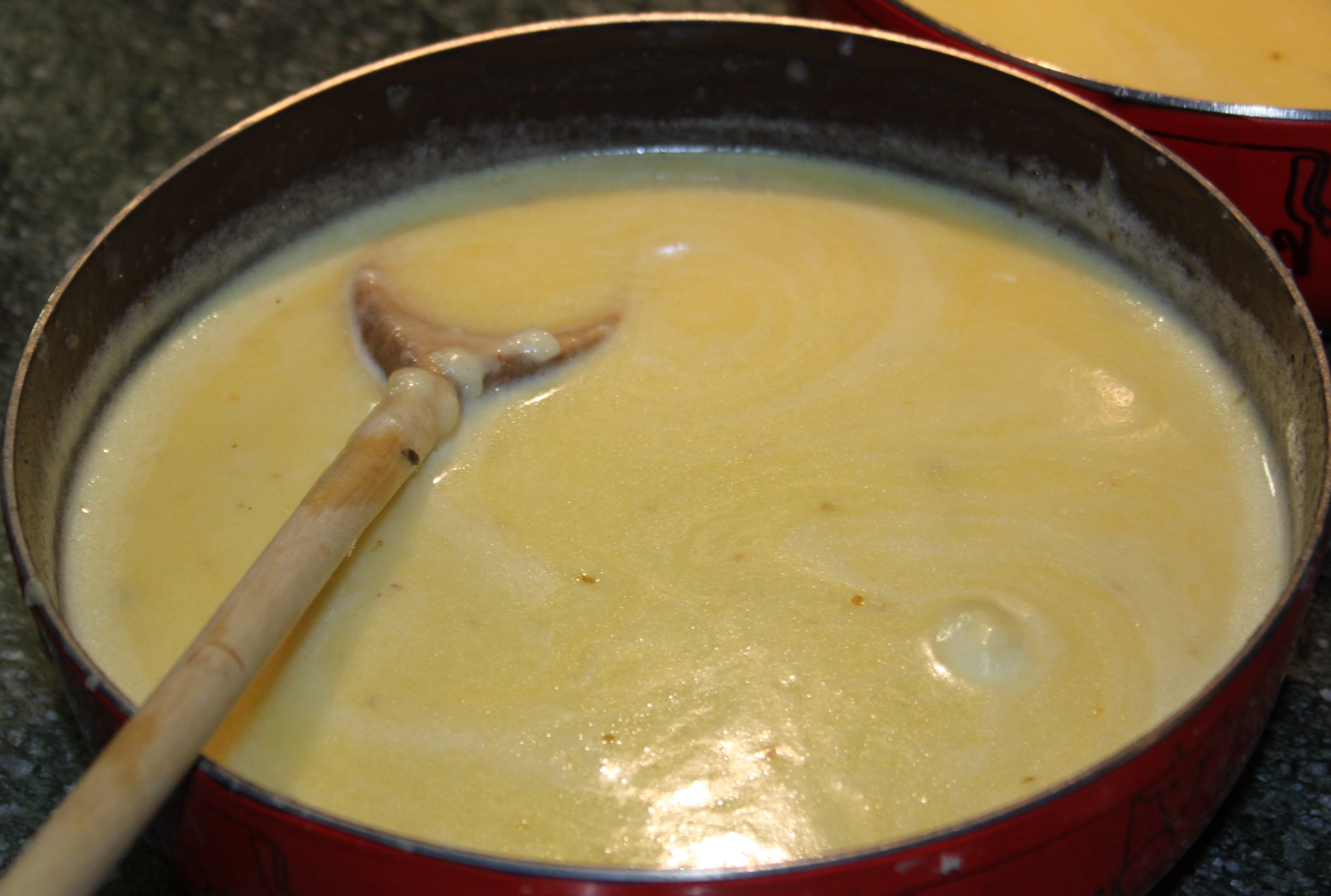 Caquelon de miromando vivarois